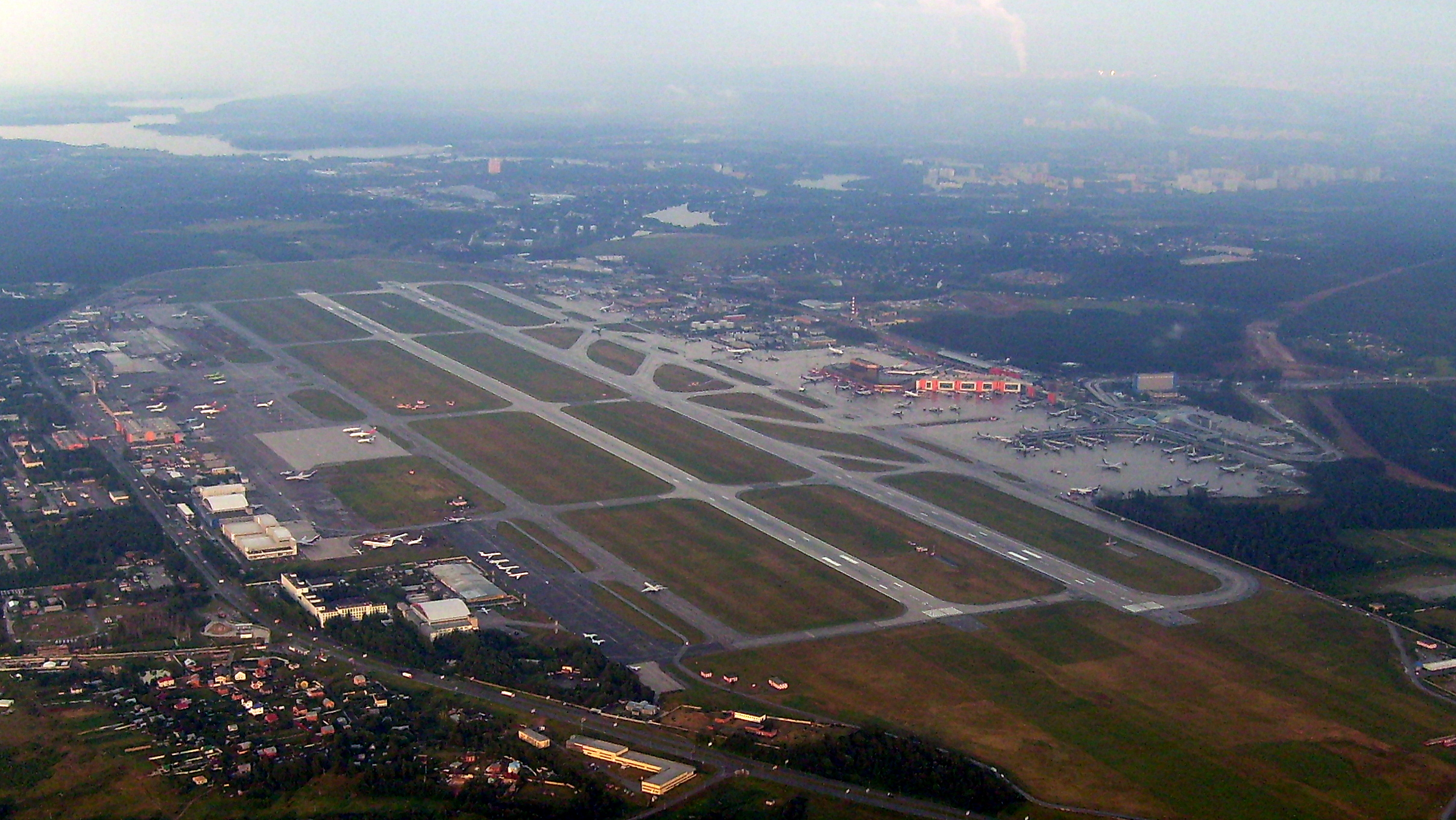 Вид на Шереметьево из взлетающего самолета